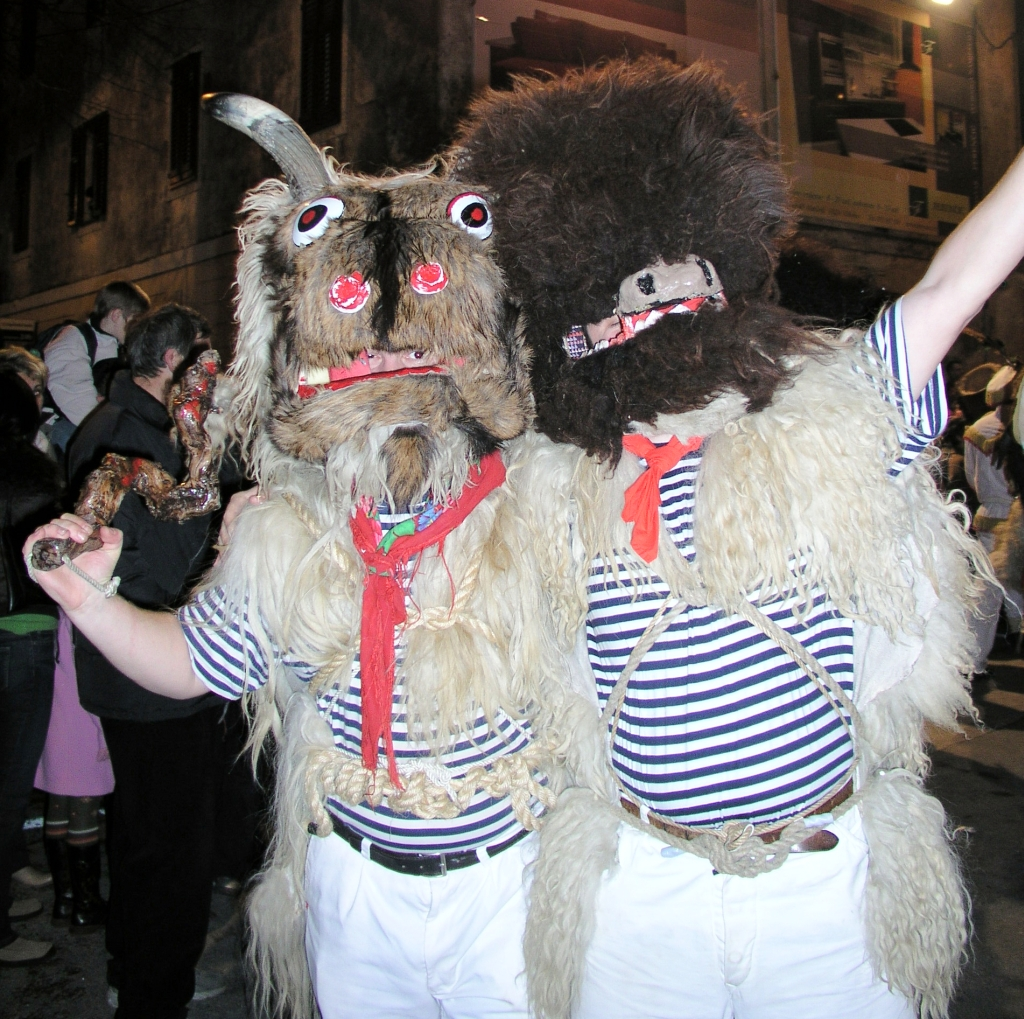 Halubajski zvončari, Viškovo, Hrvatska